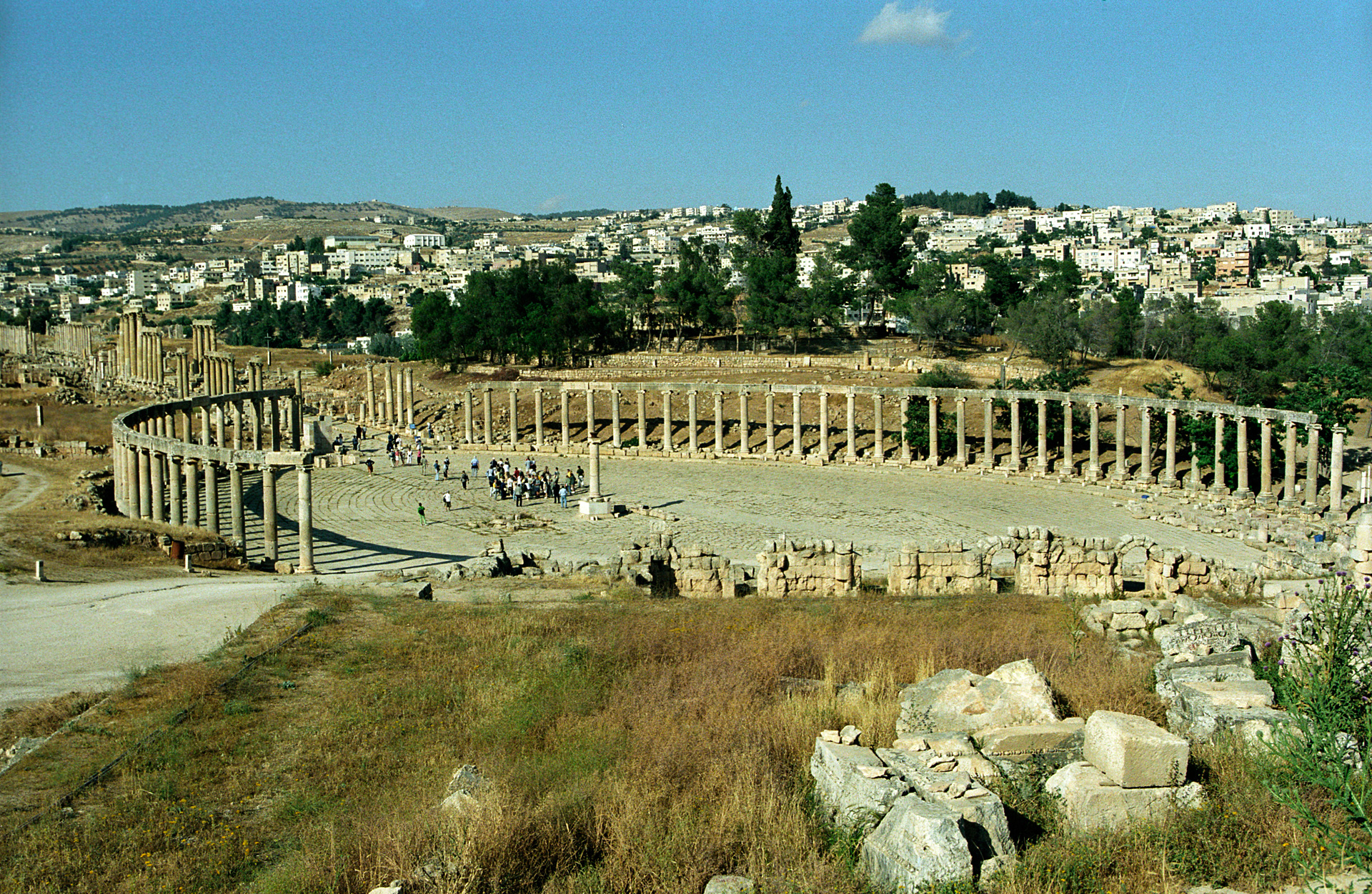 Jerash, Jordan